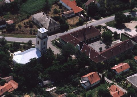 Tiszaszentimre, Hungary, aerialphotgraphy. - Református templom, Jász-Nagykun-Szolnok m, Tiszaszentimre, Kisfaludy köz